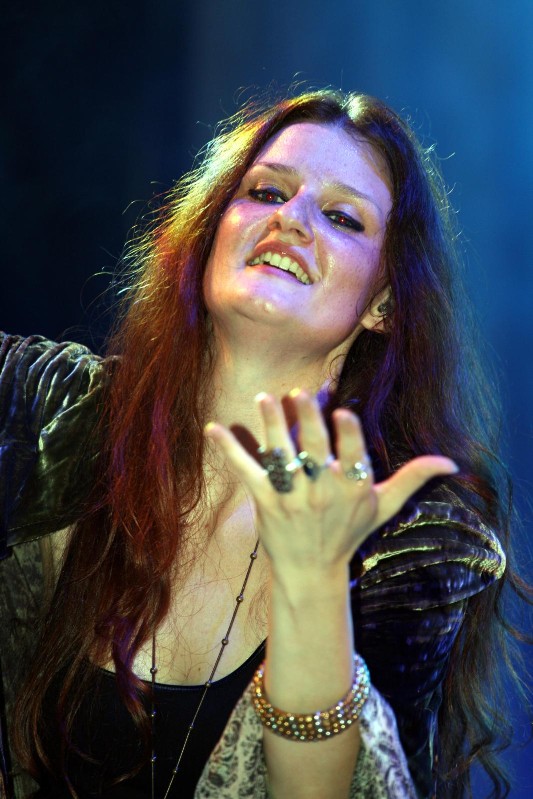 Irene Fornaciari a Suzzara (MN) - 11 giugno 2010